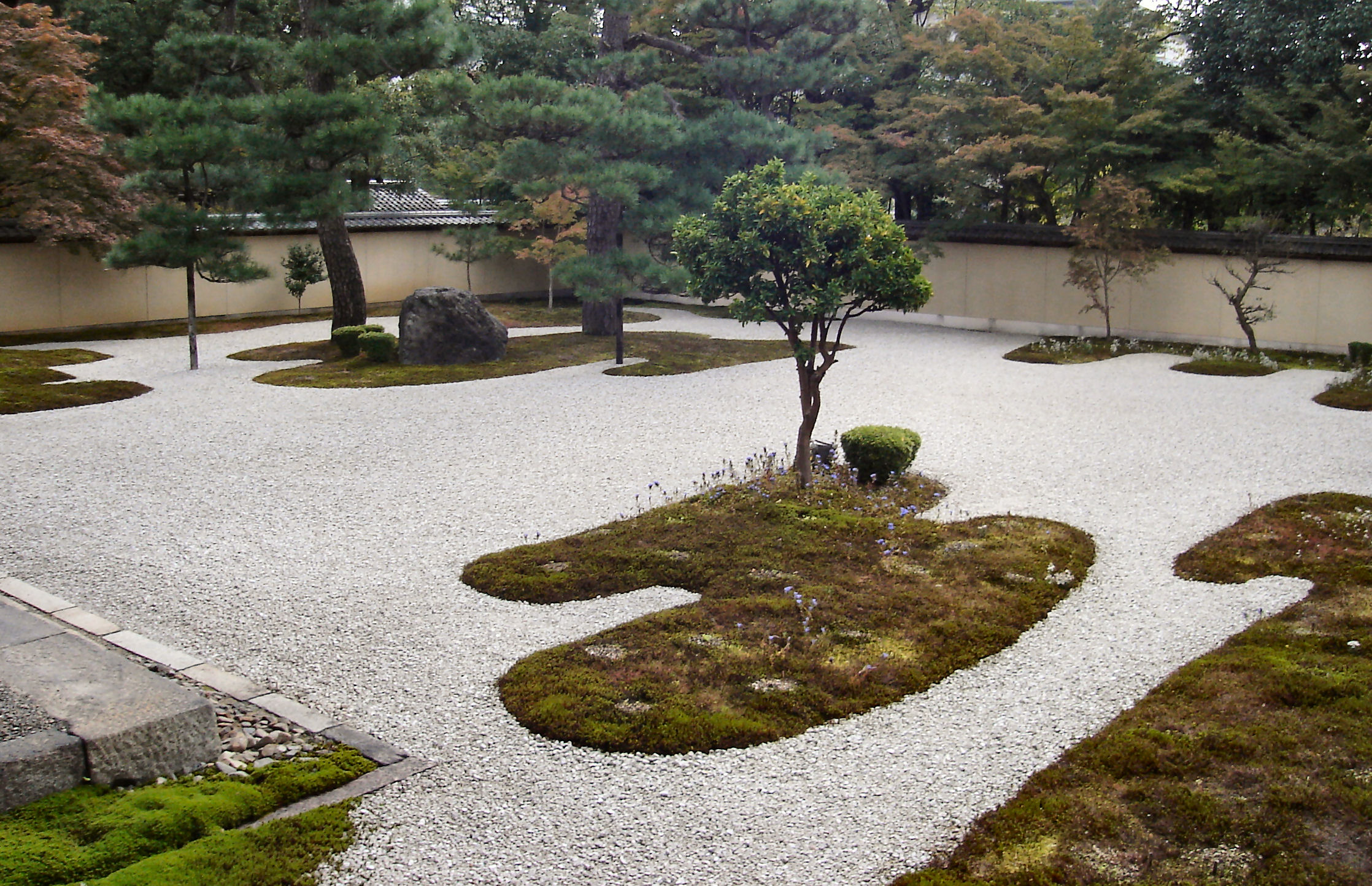 Rozanji teien